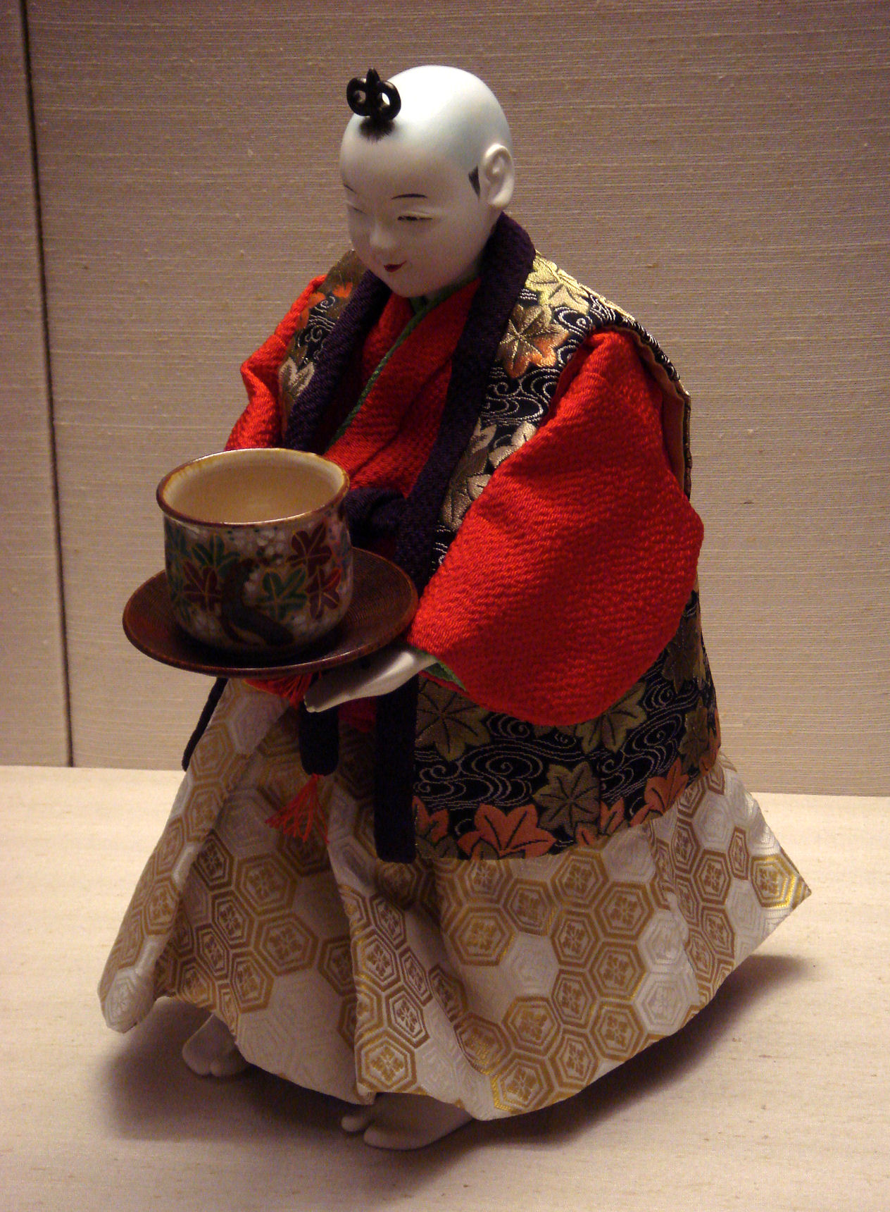 Japanese Karakuri, circa 1800